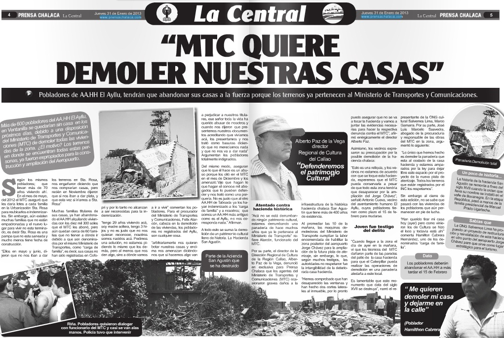 Diario La Prensa Chalaca abordó problemática de la Casa Hacienda San Agustín. "Defenderemos el Patrimonio Cultural", fueron las palabras del Director Regional de Cultura, Alberto Paz de la Vega Mayandia. Hubo un testigo de los intentos de demolición de la Casa Hacienda.